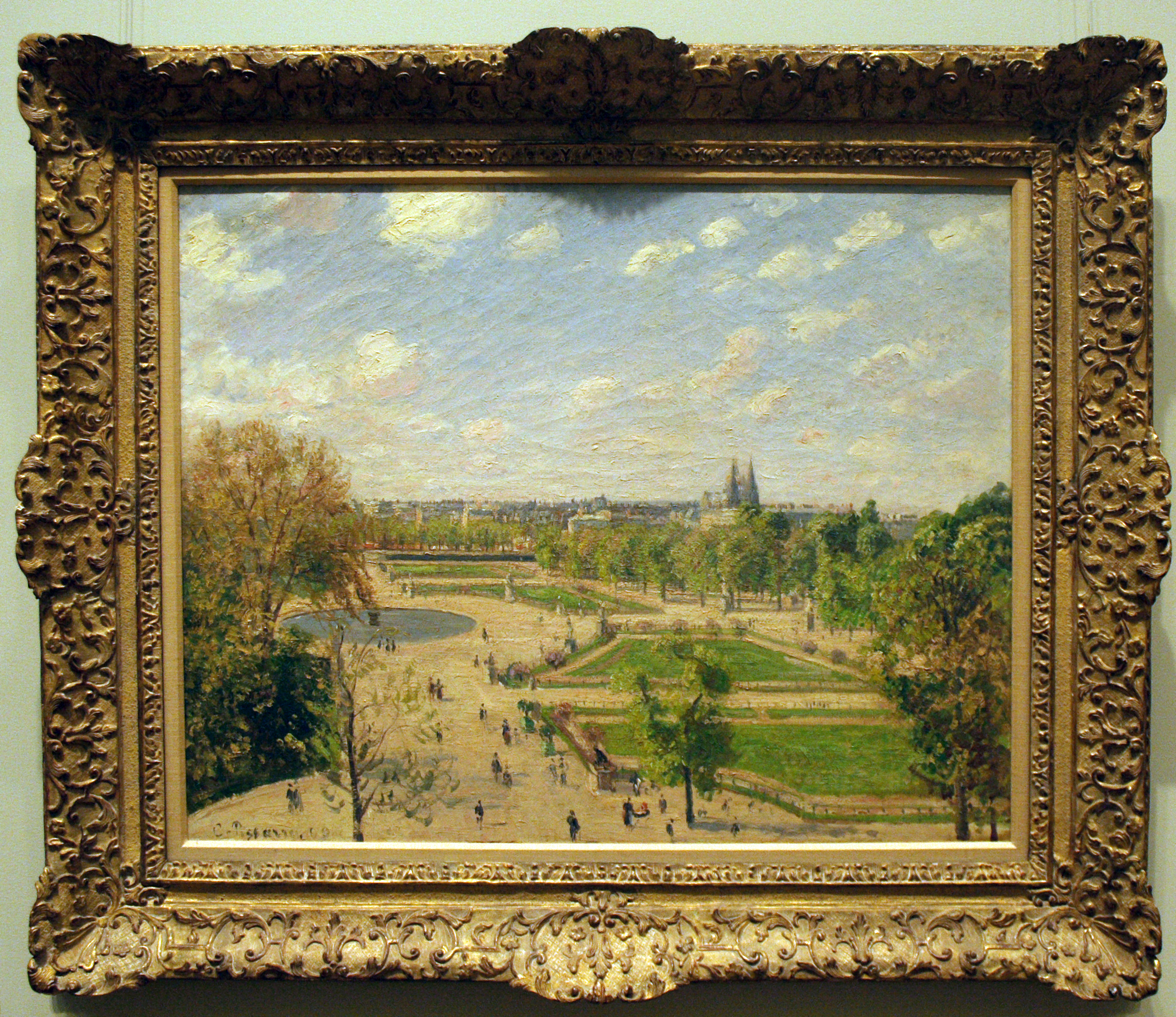 Pissarro festménye a New York-i Metropolitan Múzeumban